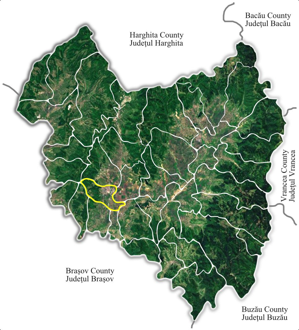 Sfantu Gheorghe jud Covasna